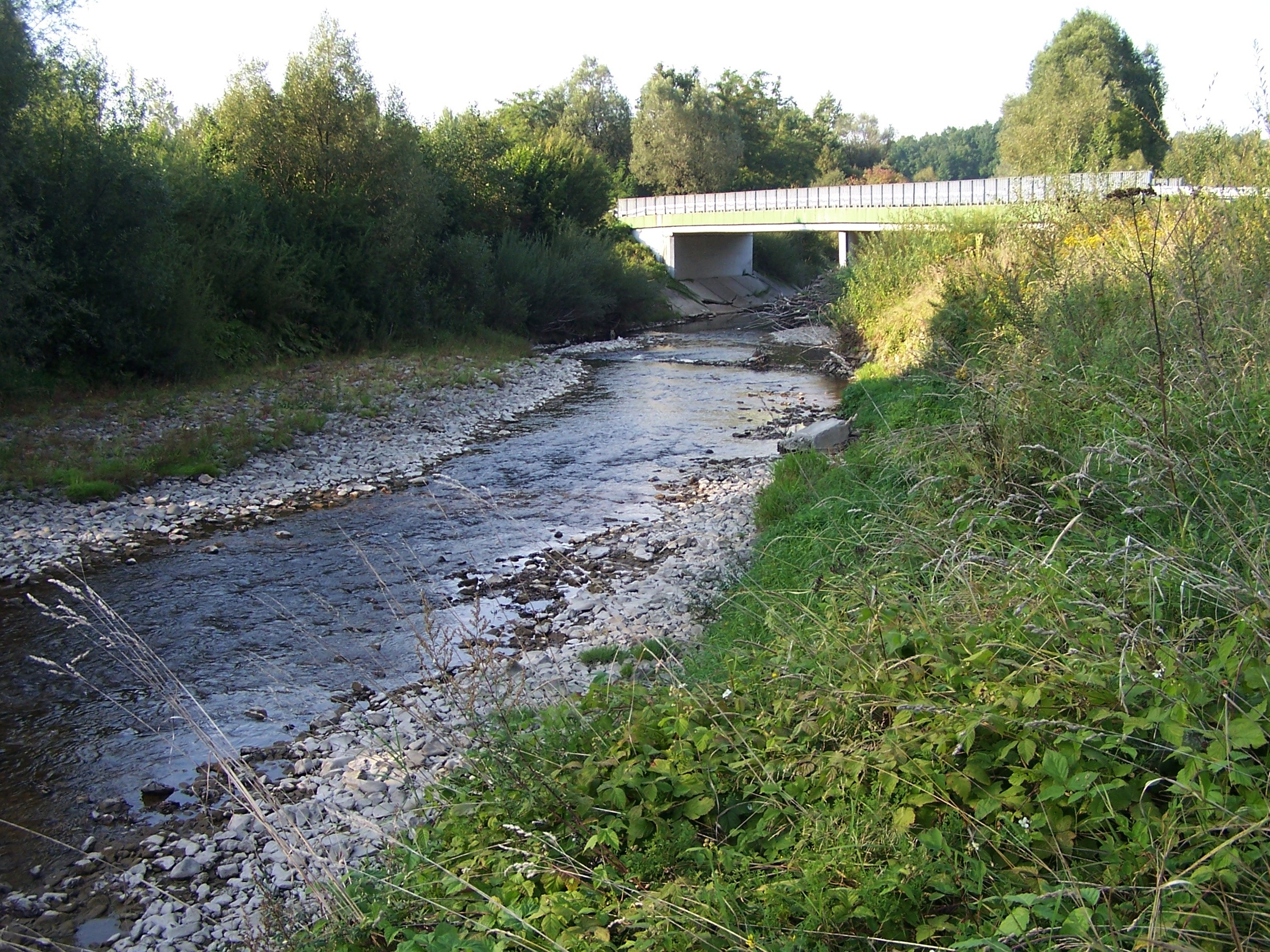 Rzeka Tarnawka w Tarnawie